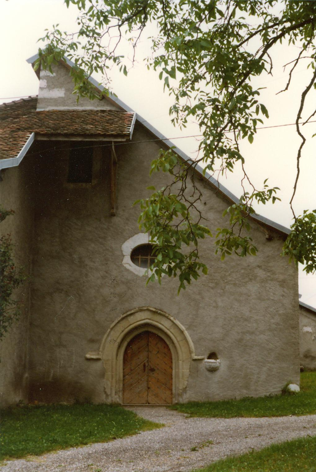 Ancienne église paroissiale de Chevrier, Haute-Savoie. Elle contient de belles fresques.